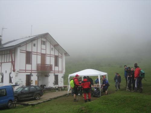 San Adriango mendi-aterpea. Aizkorri, Gipuzkoa. Euskal Herria. San Adrian's mountain hut. Aizkorri, Guipuscoa. Basque Country.